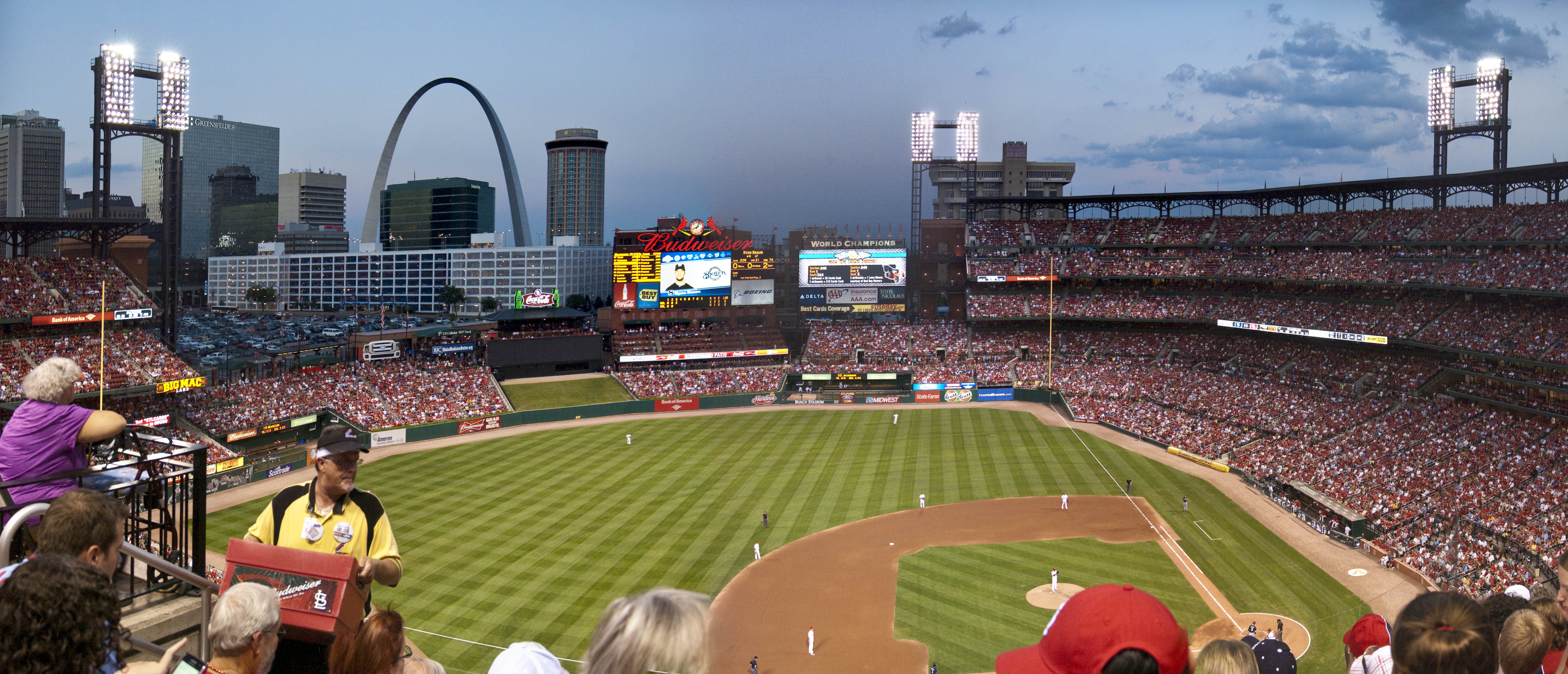 St. Louis, MO